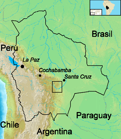 Mapa de Bolivia. Zona en la que actuó el Che Guevara en 1967.